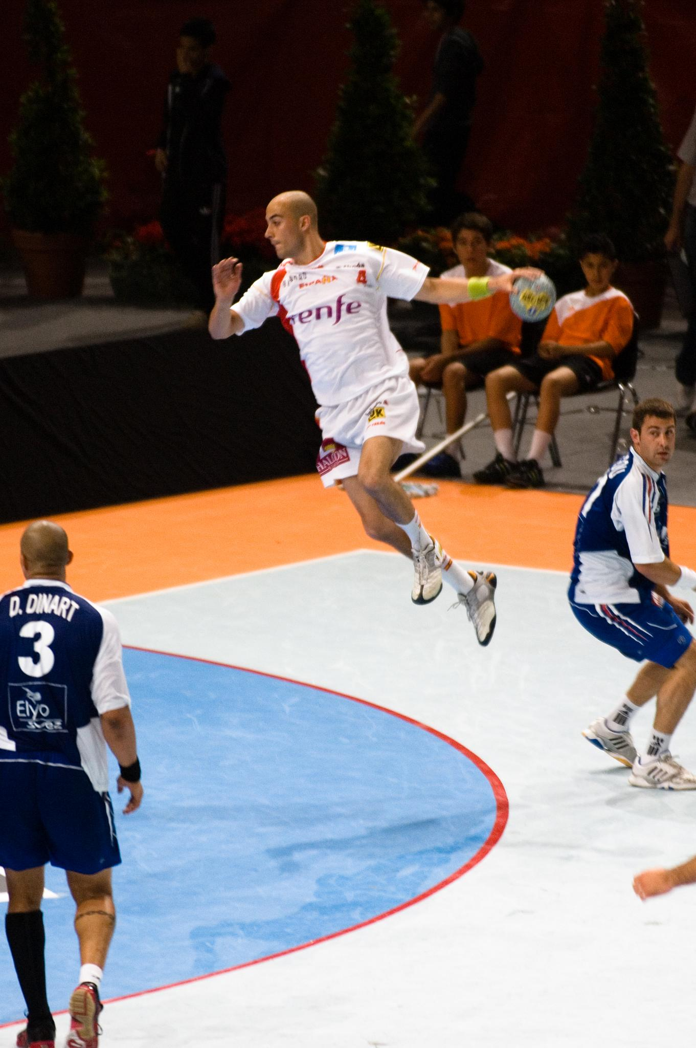 Photo prise pendant le match France-Espagne du tournoi de qualification préolympique pour Pekin 2008. Paris Bercy. Victoire de la France ! es: Albert Rocas en plena acción en un partido ante francia en el preolímpico de Pekín 2008 disputado en el Paris Bercy